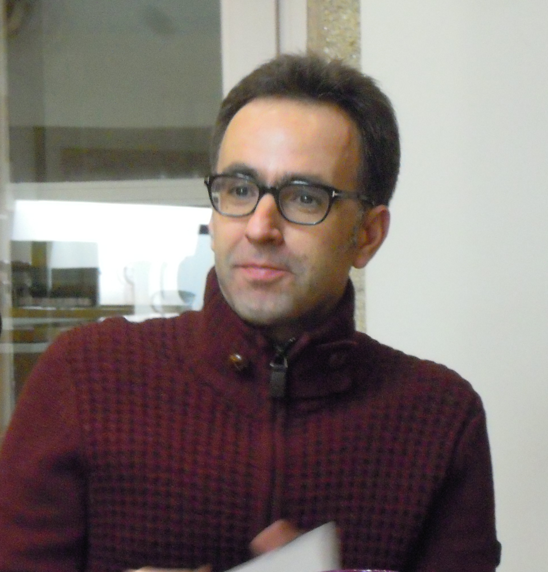 O escritor Harkaitz Cano presentando a novela Pasaia blues na libraría Couceiro de Santiago de Compostela